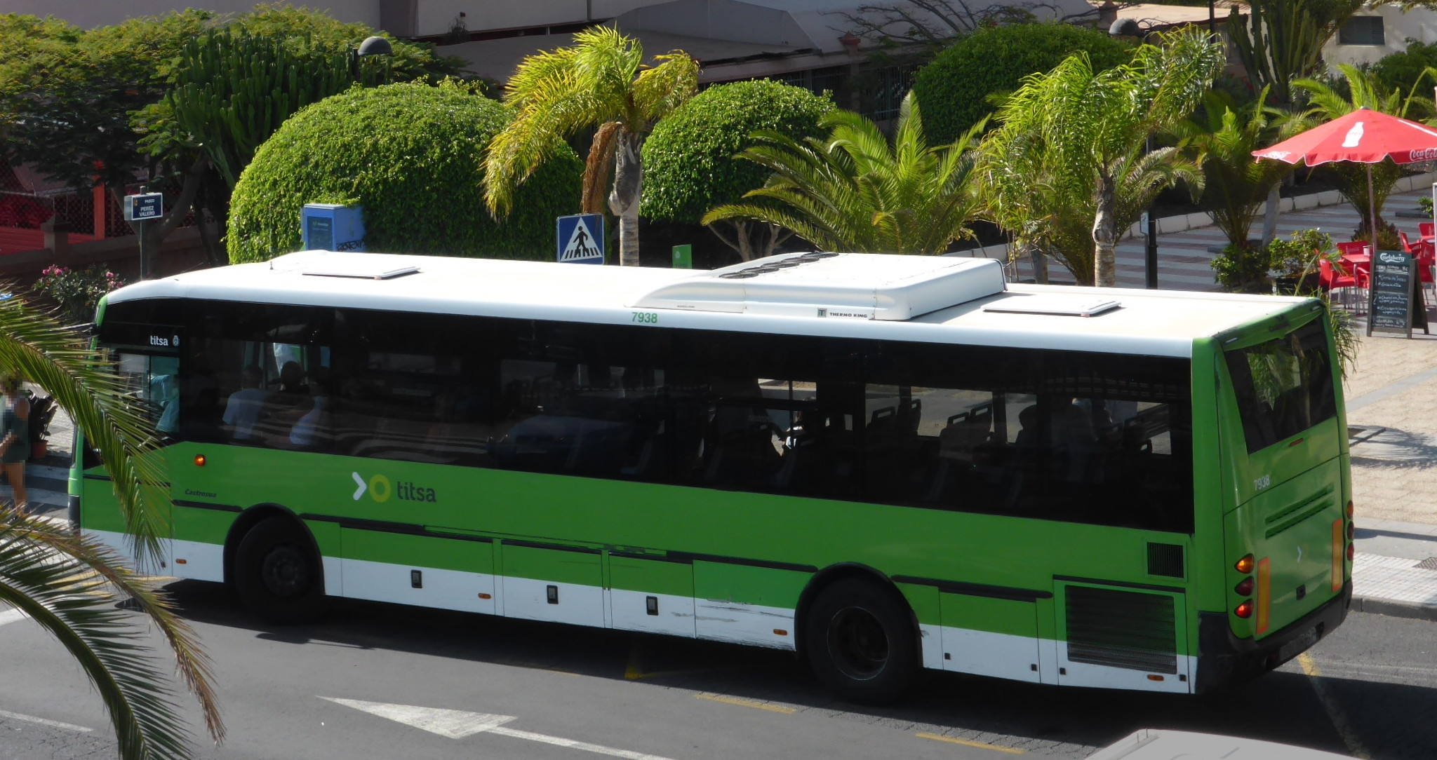 Linienbus in Playa de los Cristianos (Teneriffa), avenida Chayofita.